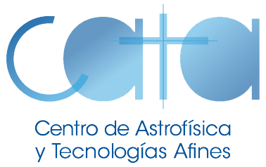 Este es el Logo Oficial del Centro de Astrofísica CATA